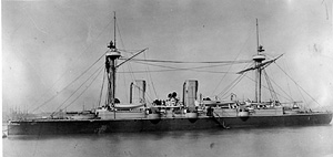 Crucero Esmeralda (1884) al momento de vendersele a Japón en 1895